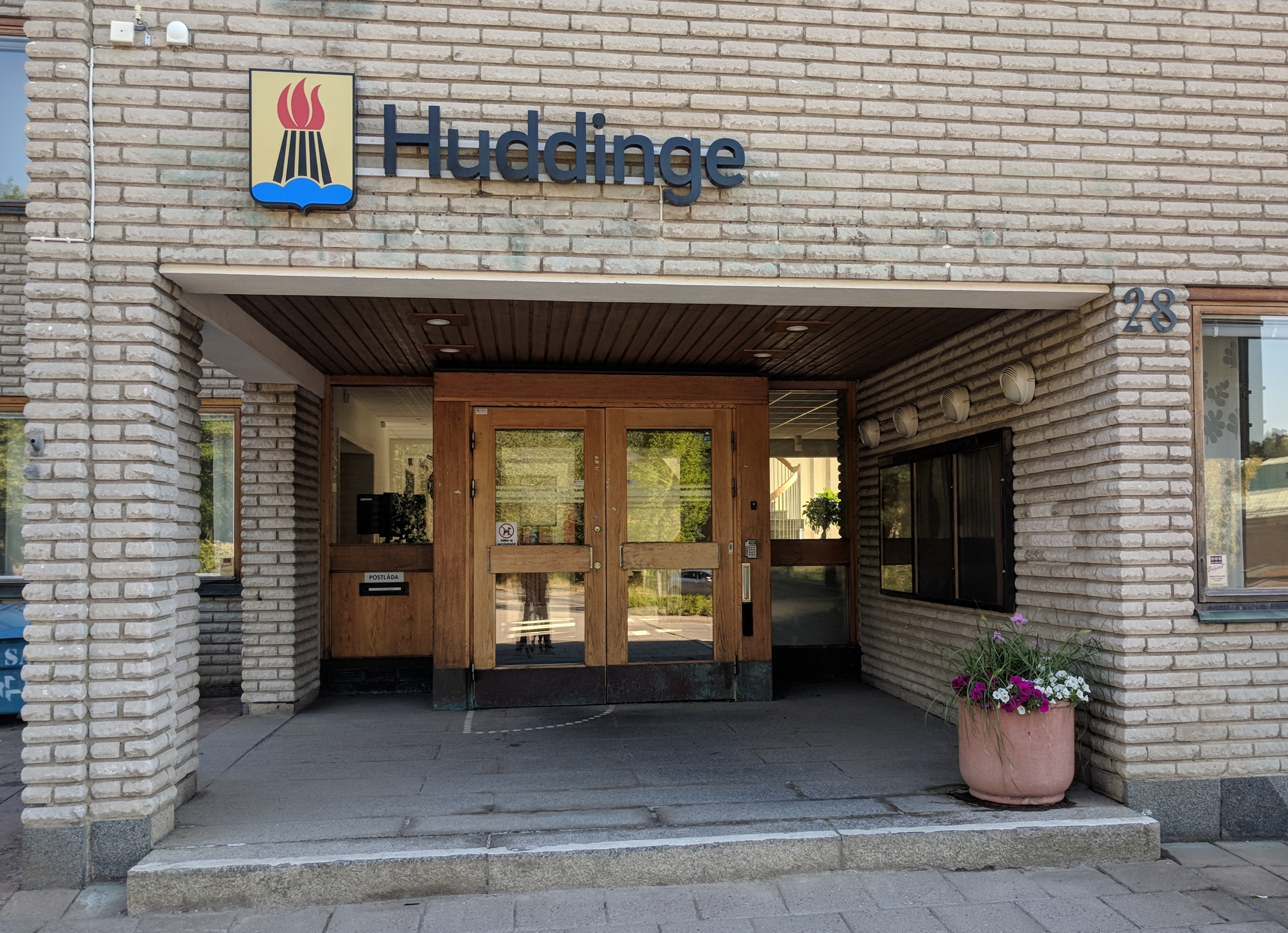 Ingång till Huddinge kommun